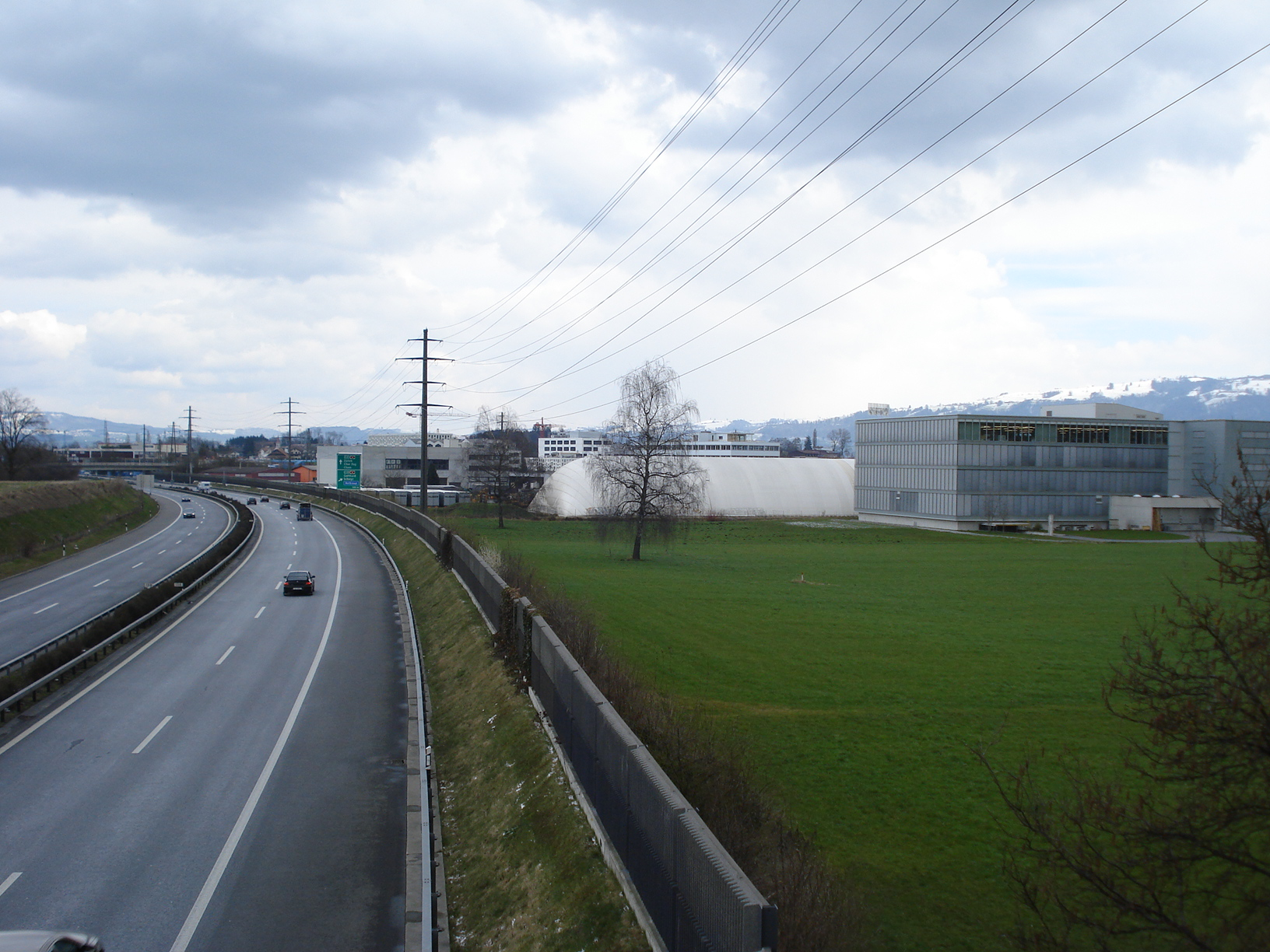 Rotkreuz